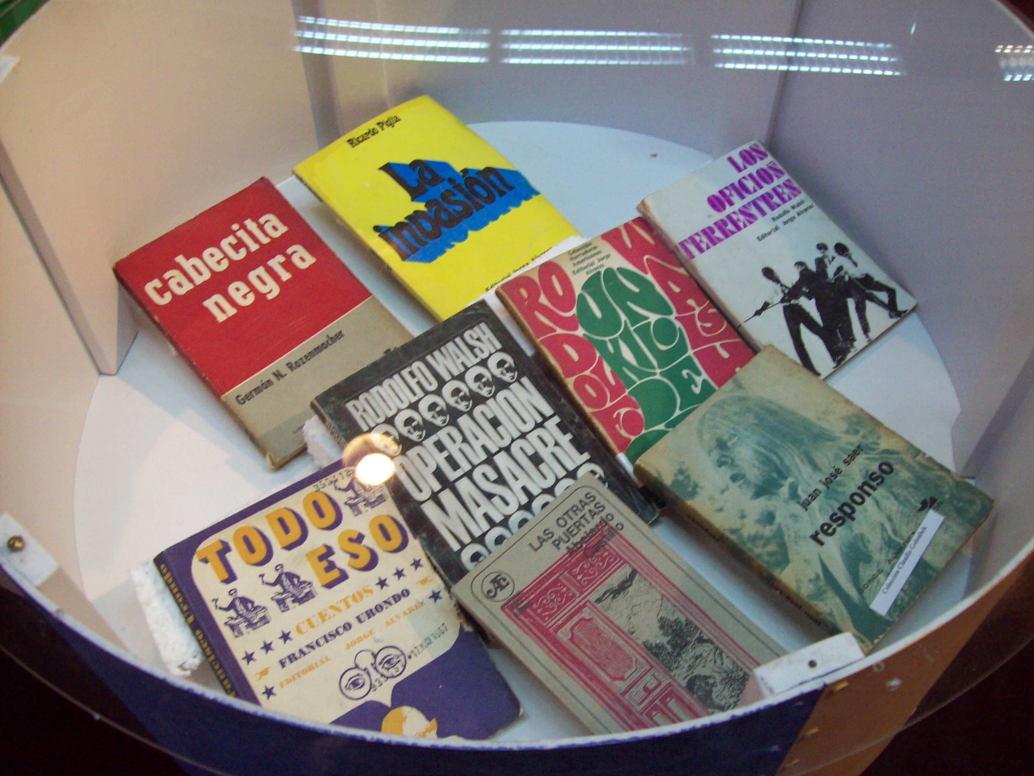 Primeros libros editados por jorge Álvarez, entre ellos se destacan Cabecita Negra y Operación Masacre.